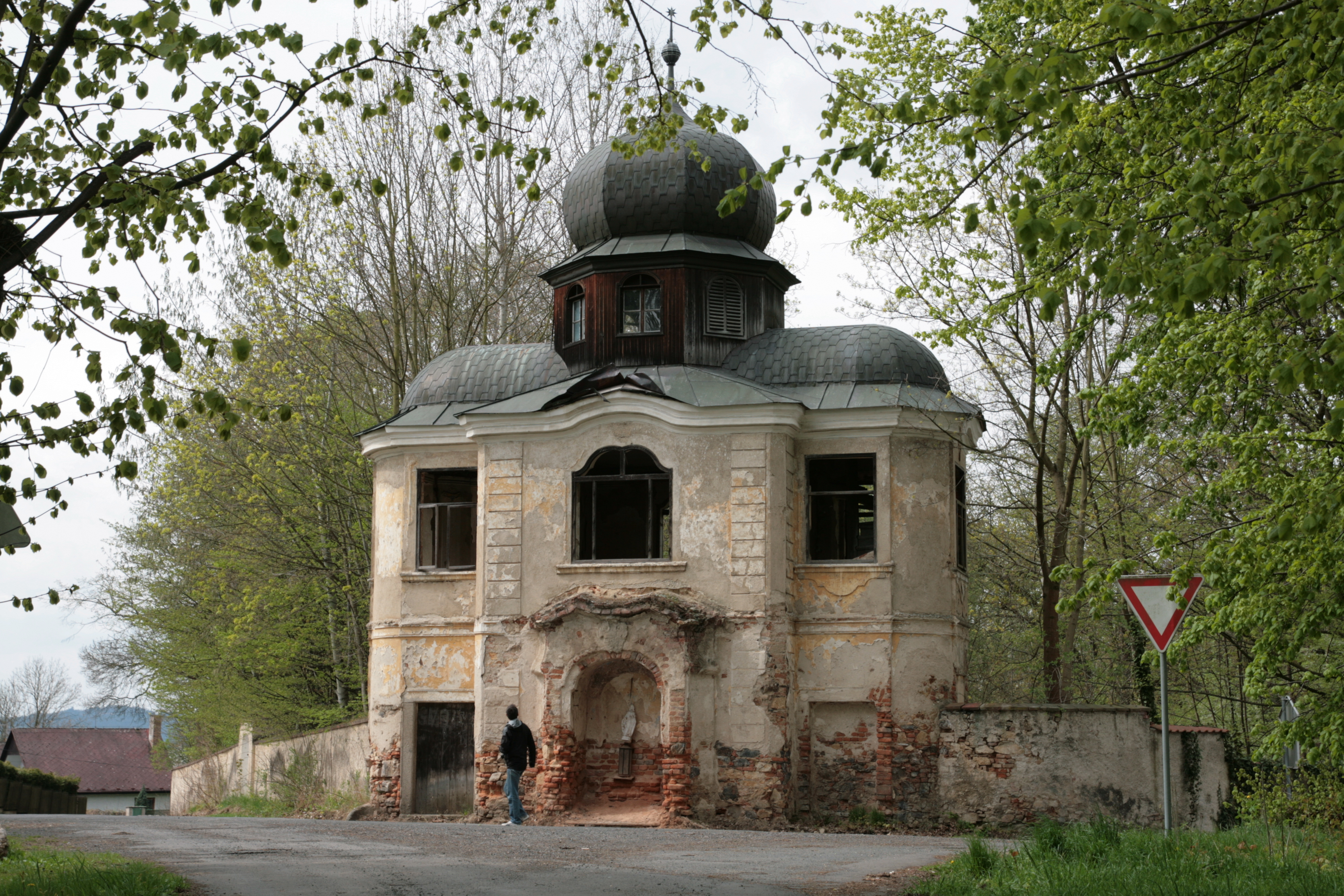 Vesnice Otín, část města Klatovy. Zámek s oborou.